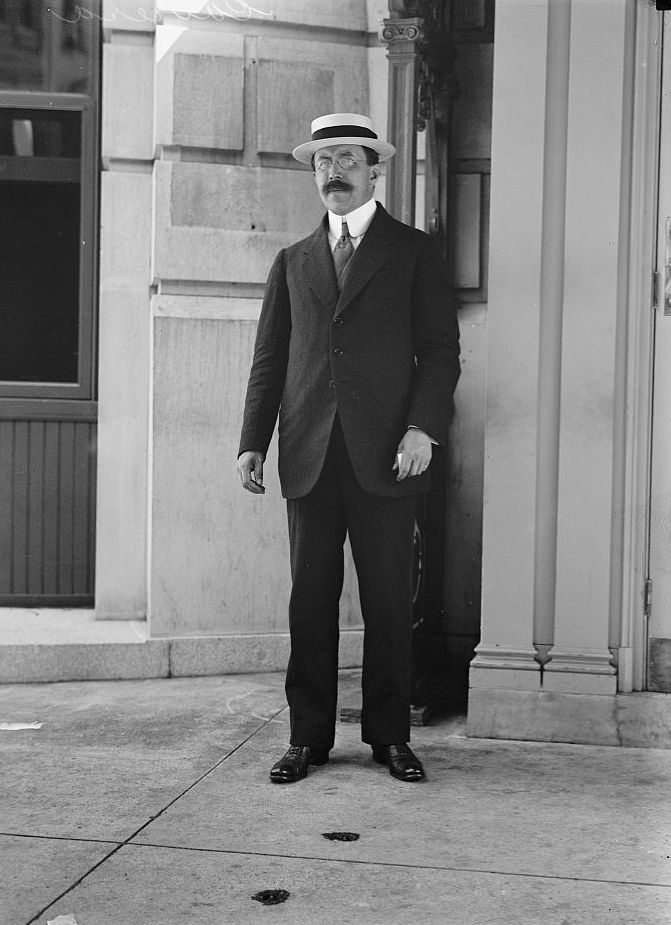 Luis Cabrera Lobrato. Político mexicano